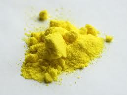 Stronsiyum kromat kristalleri